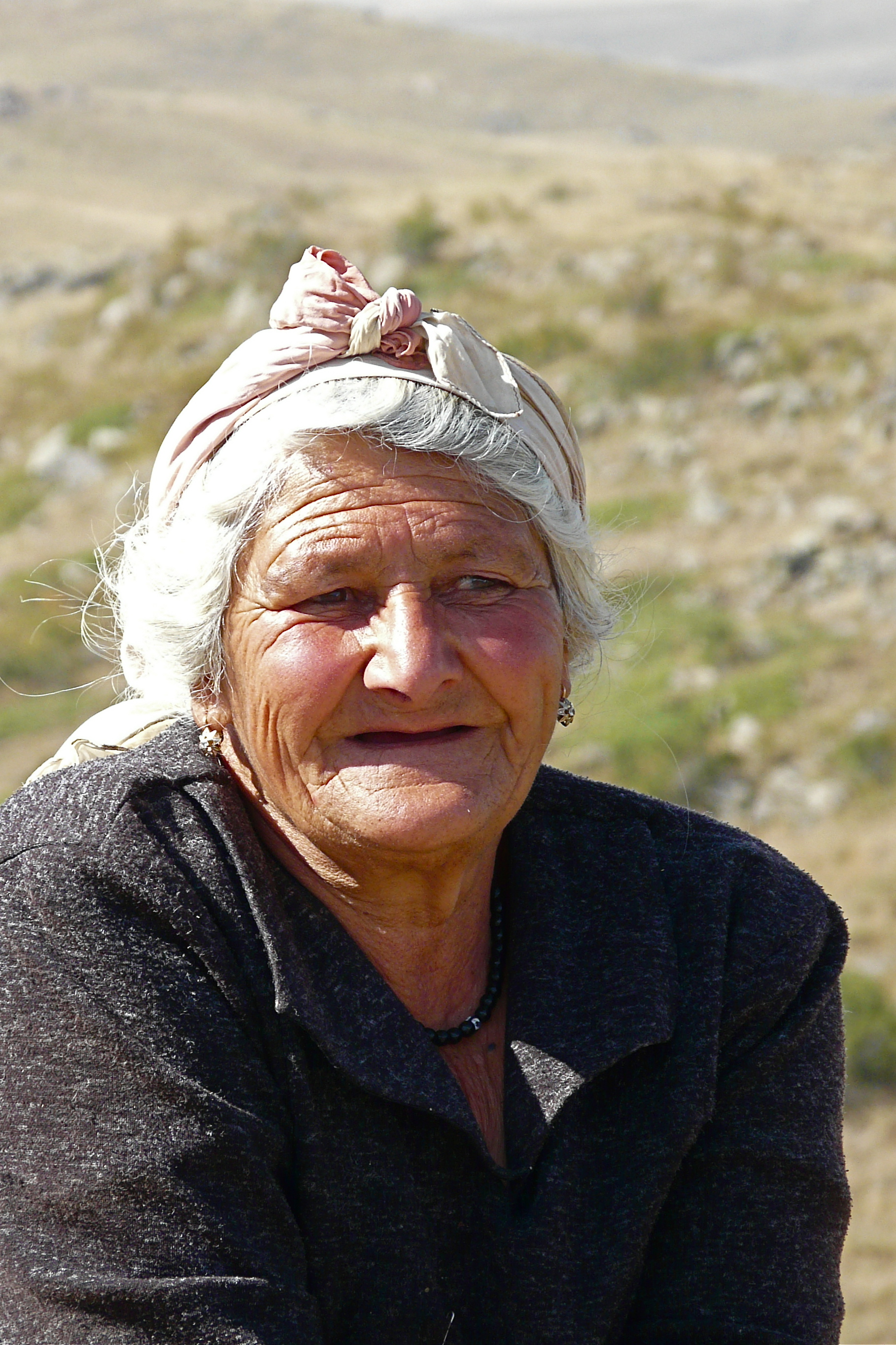 Amberd - Armenia